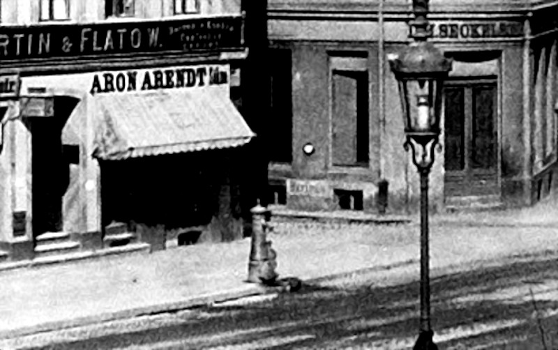 Am Molkenmakt vor dem Eckhaus Nr.7 zur Eiergasse stand seit 1877 bis in die 1920er Jahre ein eiserner Rohrbrunnen vom Typ Lohde III. Der Ausschnitt entstammt dem Foto von F. Albert Schwartz 1885: Blick vom Molkenmarkt in die Spandauer Straße (Quelle: bpk - Bildportal der Kunstmuseen, Bildagentur für Kunst, Kultur und Geschichte)